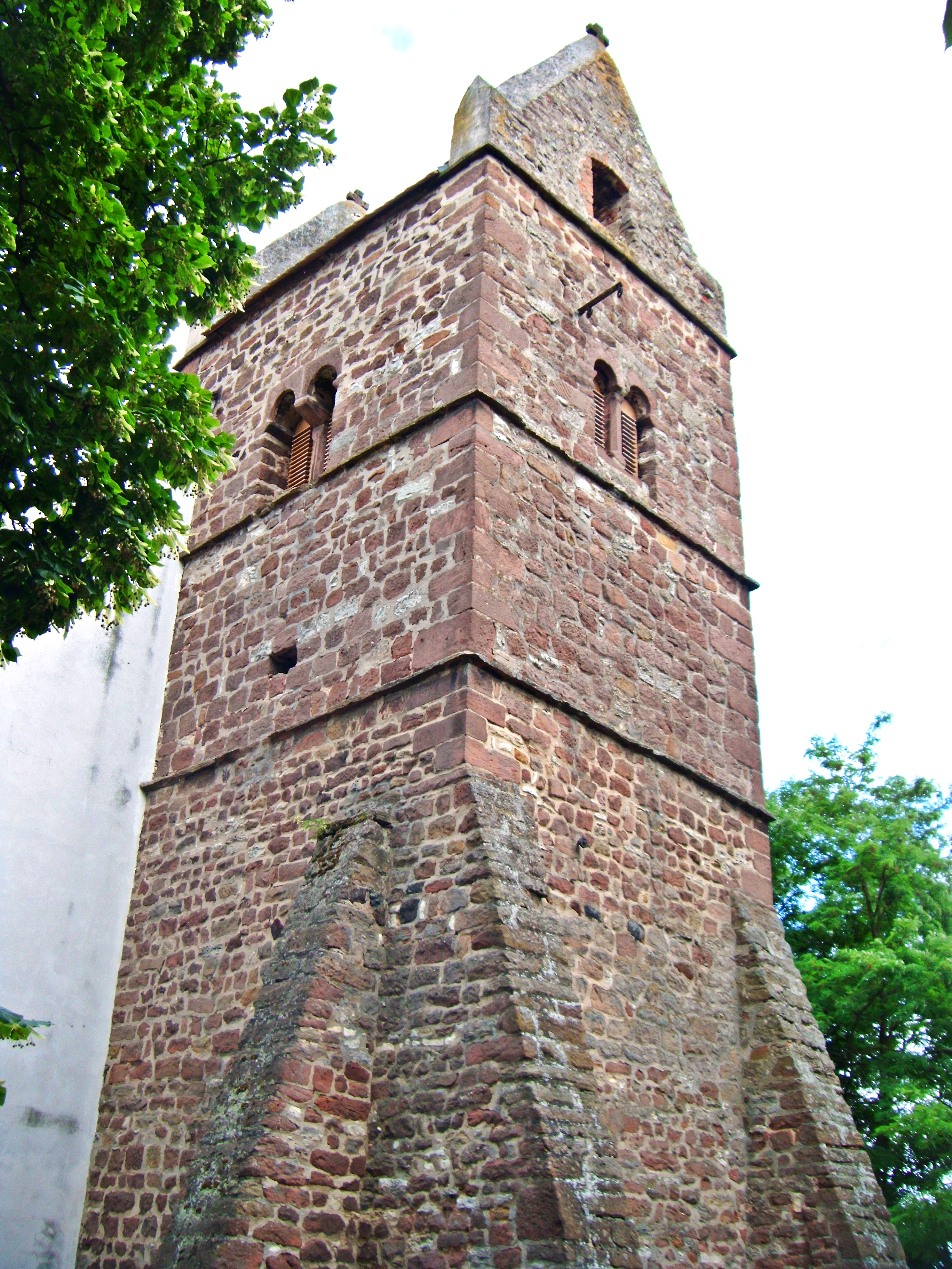 Obersülzen, Prot. Kirche, Turm von Nordwesten